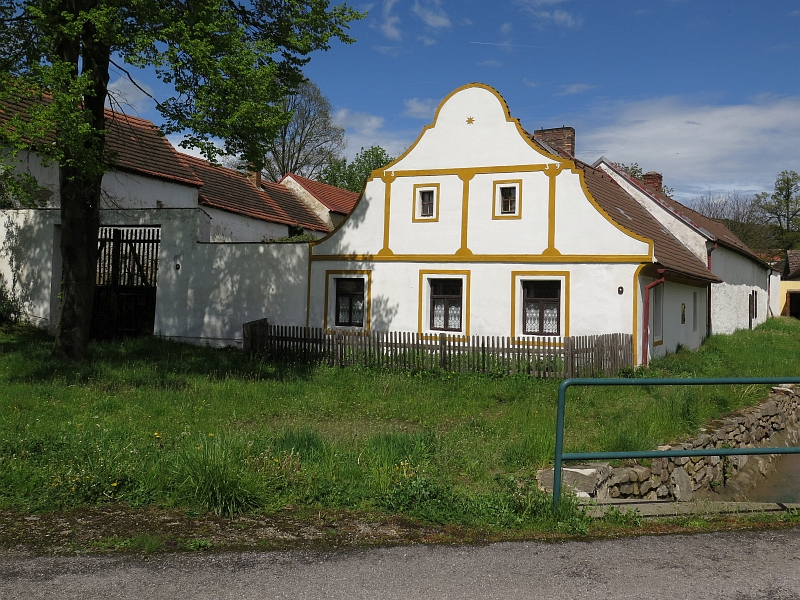 Usedlost čp. 9, Stupná 9, Stupná (Křemže).